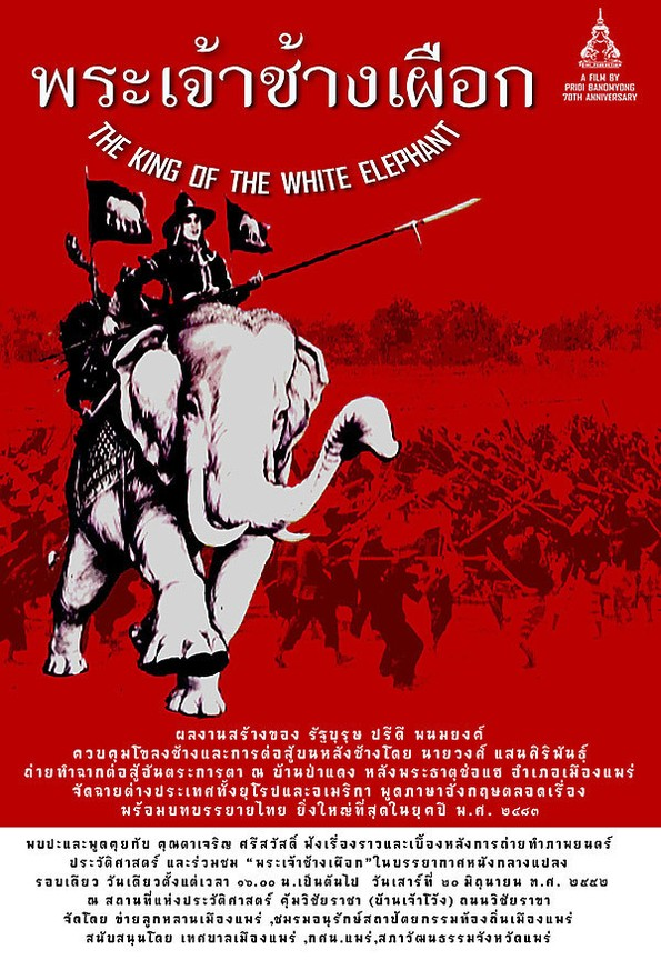 Poster originale del film "The King of the White Elephant", uscito nel 1940 e commissionato dal governo thailandese con il fine di promuovere il pacifismo a seguito della guerra franco-thailandese